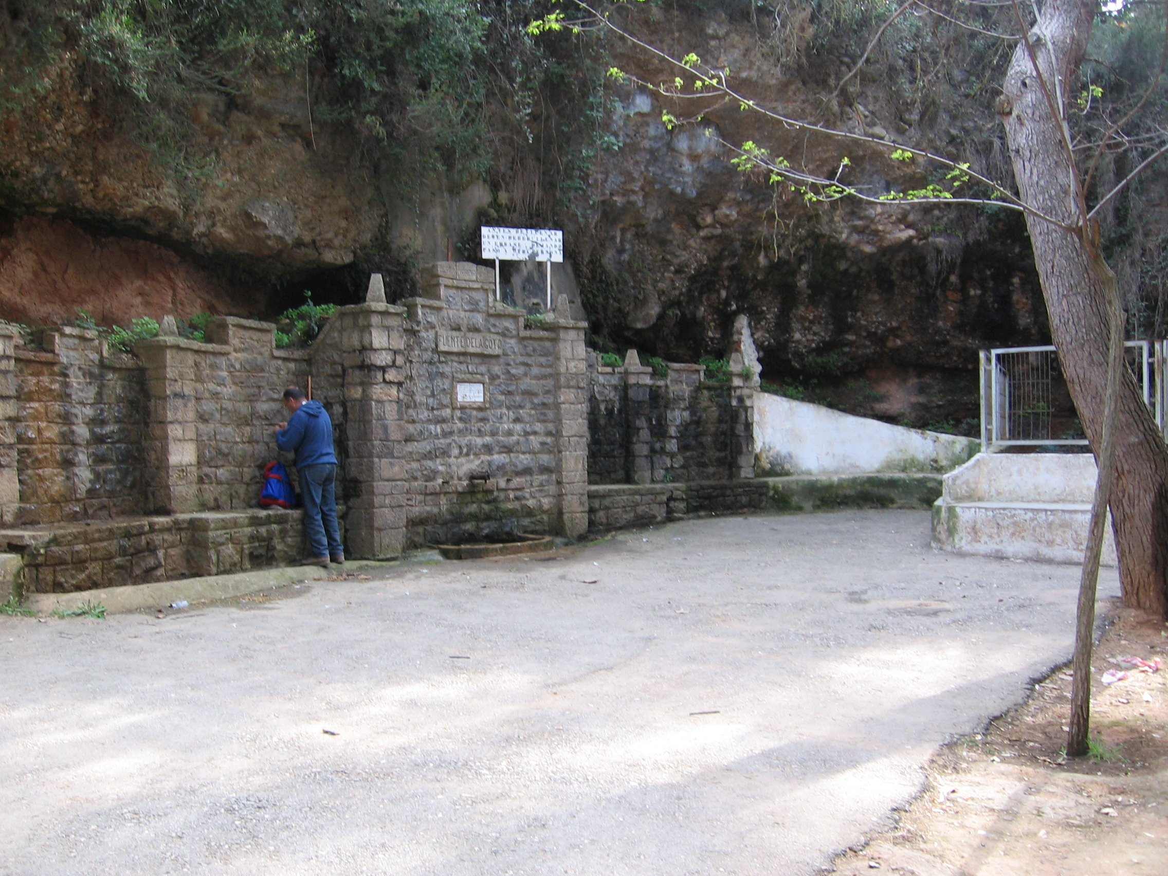 Fuente de la Gota, en Siete Aguas (Valencia, Spain). Autor: José F.Català Senent